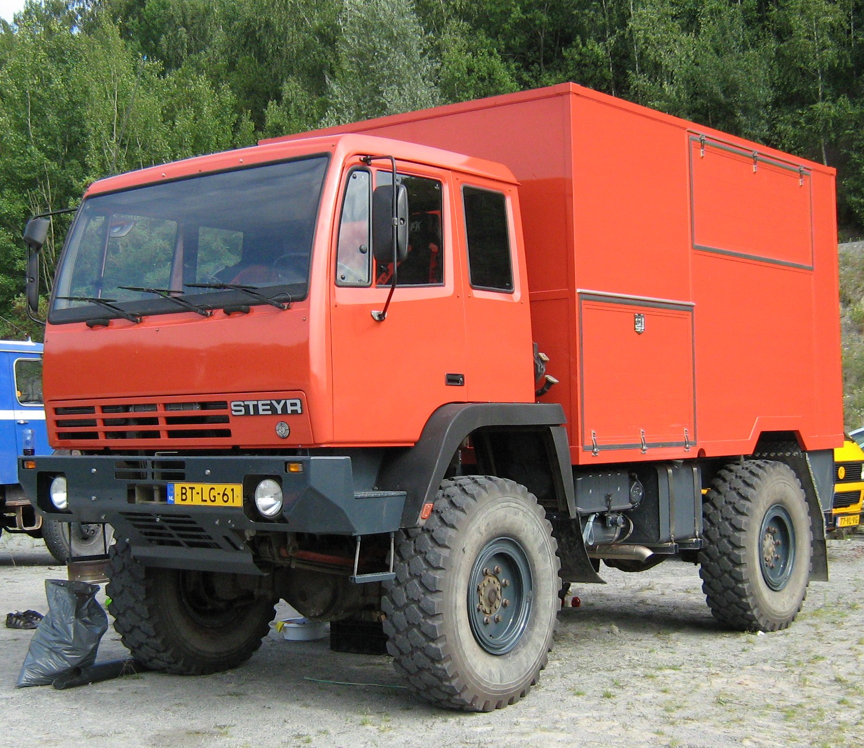 Gelände 4x4 LKW, Typ Steyr. mittlere (mittelschwere) Baureihe "serie 92", Typ 12 M 18, zivil: 12 S 18 , Steyr-Daimler-Puch A.G.